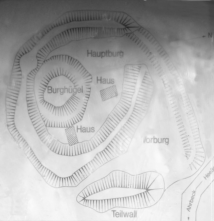 Lageskizze der Burg Heeßel auf einem Schild an der Burgstelle